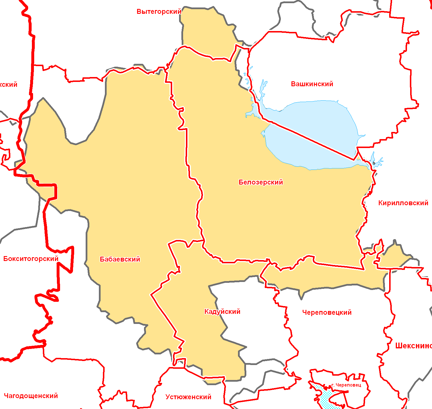 Белозерский уезд Новгородской губернии в современной сетке районов